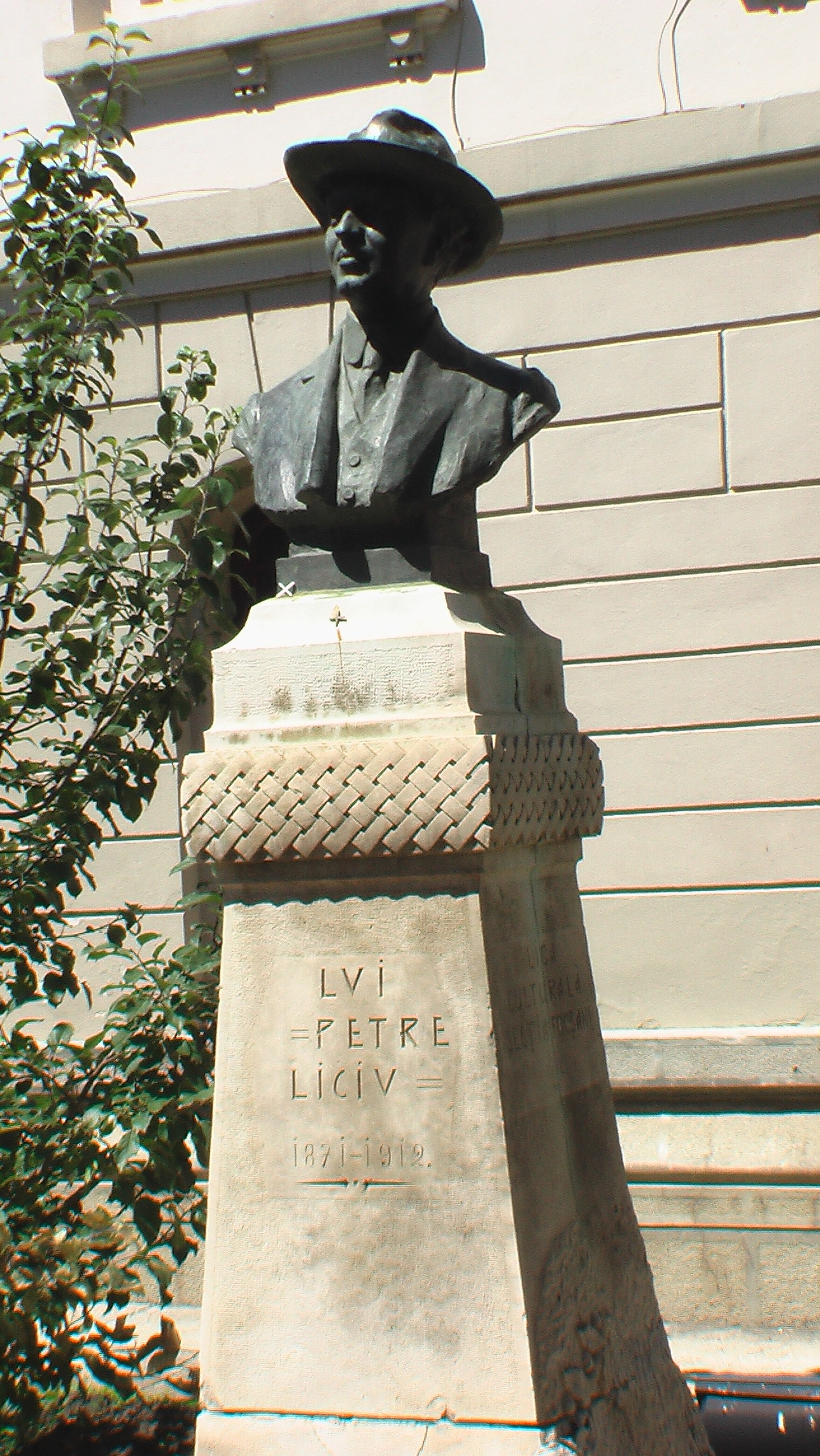 Bustul lui Petre Liciu, municipiul Focșani, Str. Republicii 77, Parcul Teatrului, 1913, Ion Mateescu (sculptor)